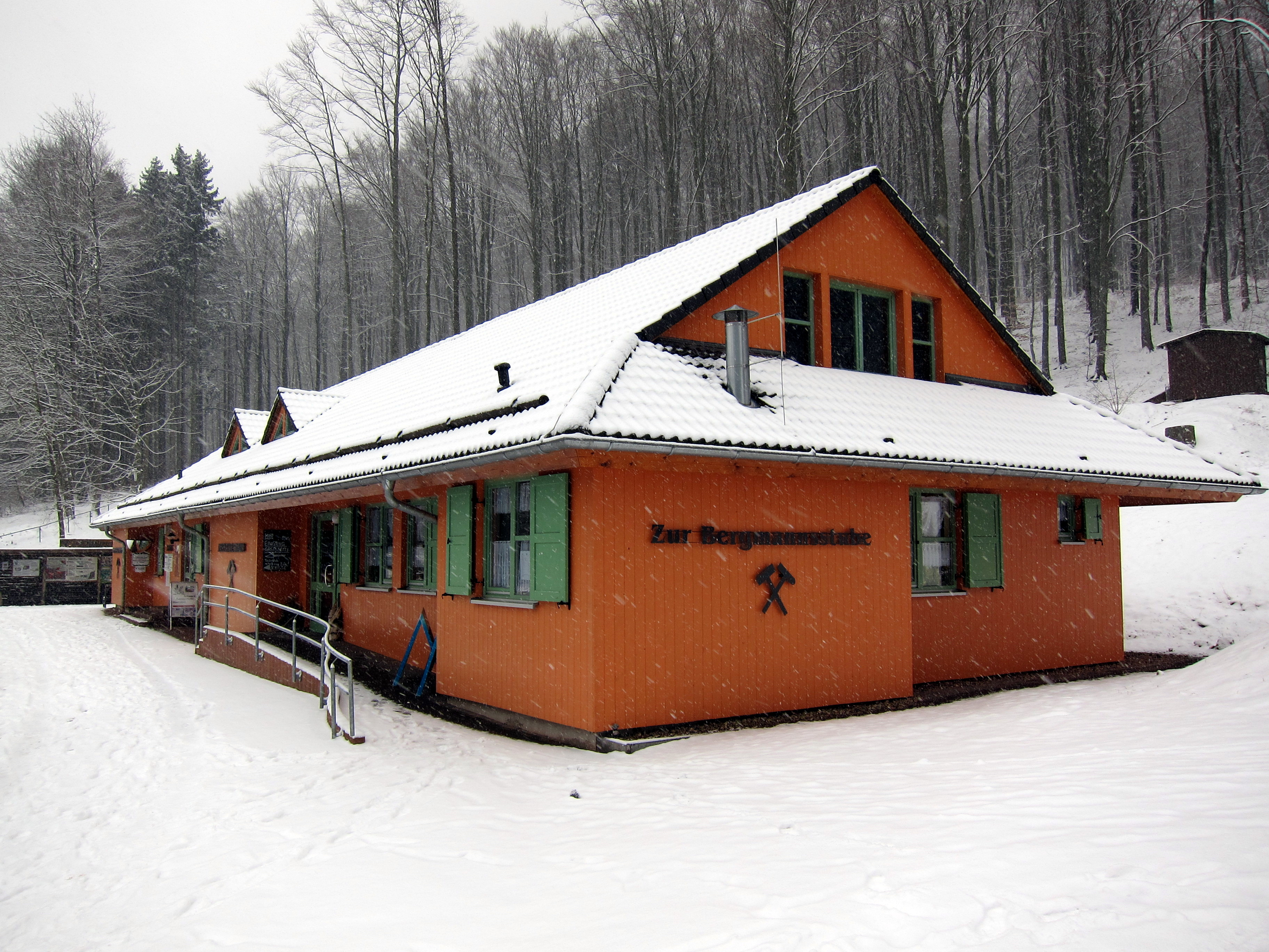 Marienglashöhle